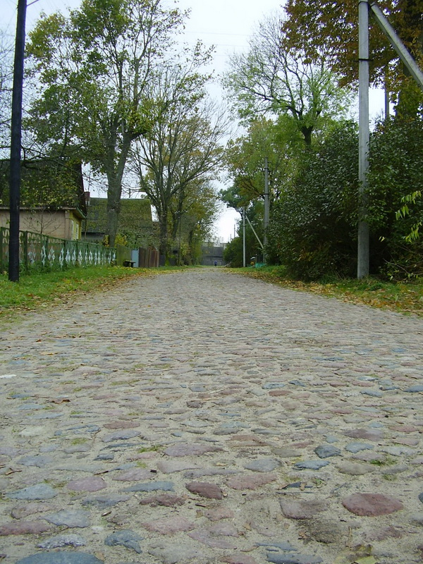 Дзяляцічы. Краявіды